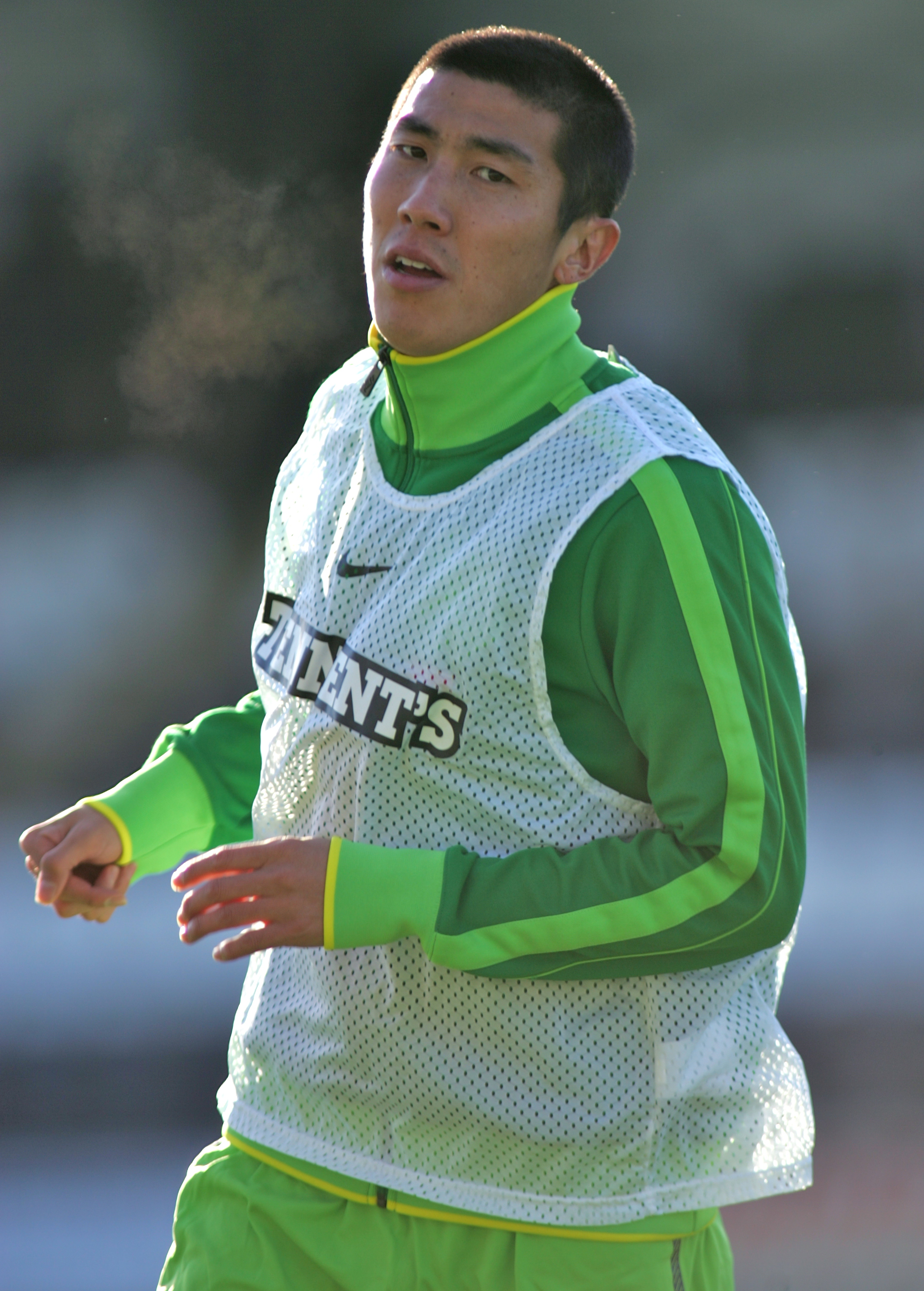 HI7Y0028